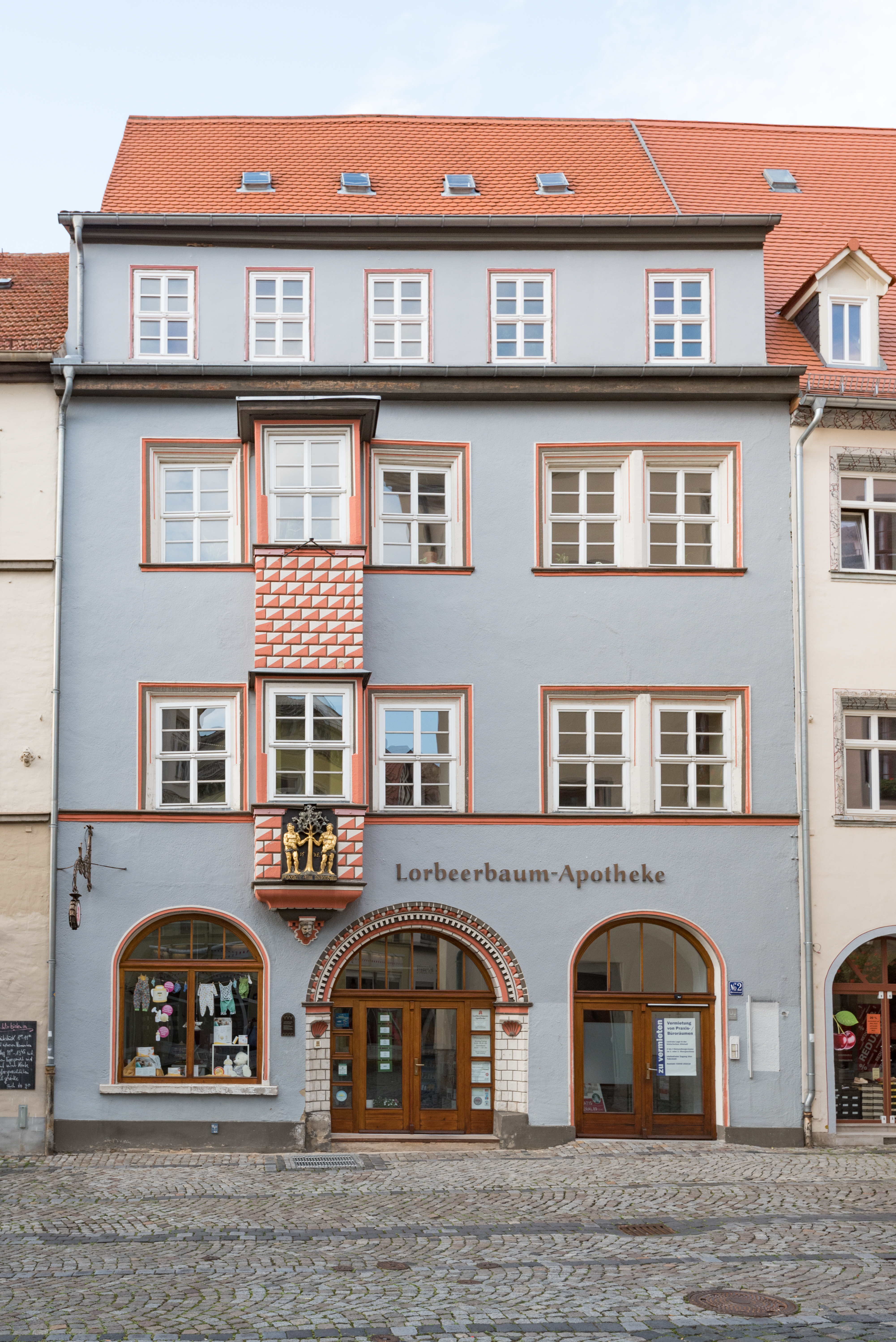 Naumburg (Saale), Herrenstraße 2